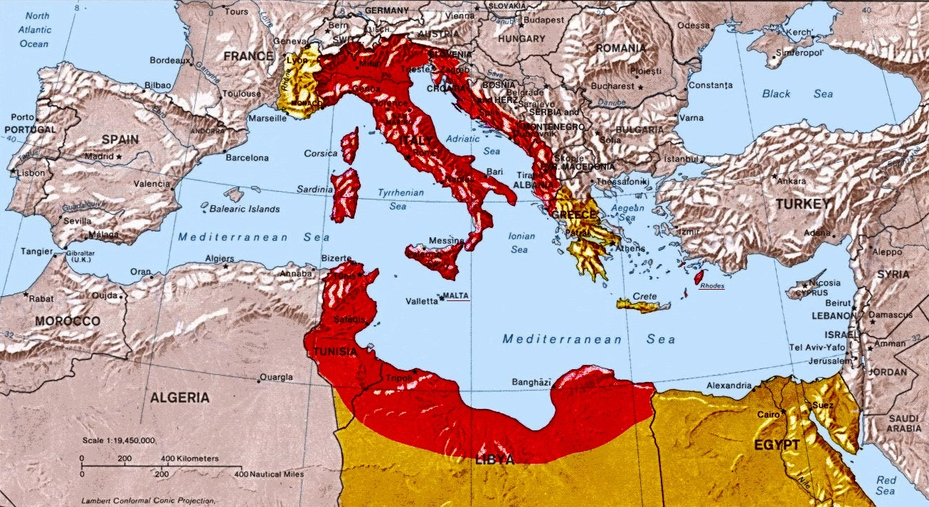 Mappa della "Grande Italia" , i territori in rosso dovevano far parte del territorio italiano , in giallo i territori dell'Impero e le conquiste territoriali italiane nel 1942.